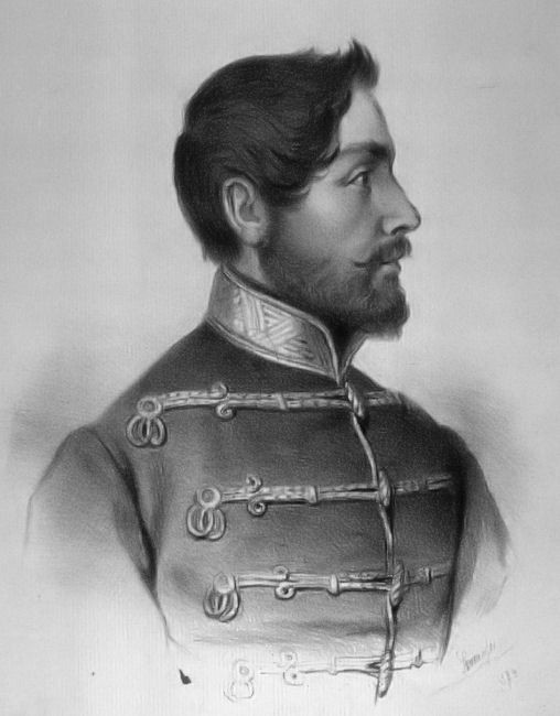 Kazinczy Lajos (1820–1849) honvéd ezredes, aradi vértanú, Kazinczy Ferenc fia portréja. Szamossy Elek litográfiája (1872)